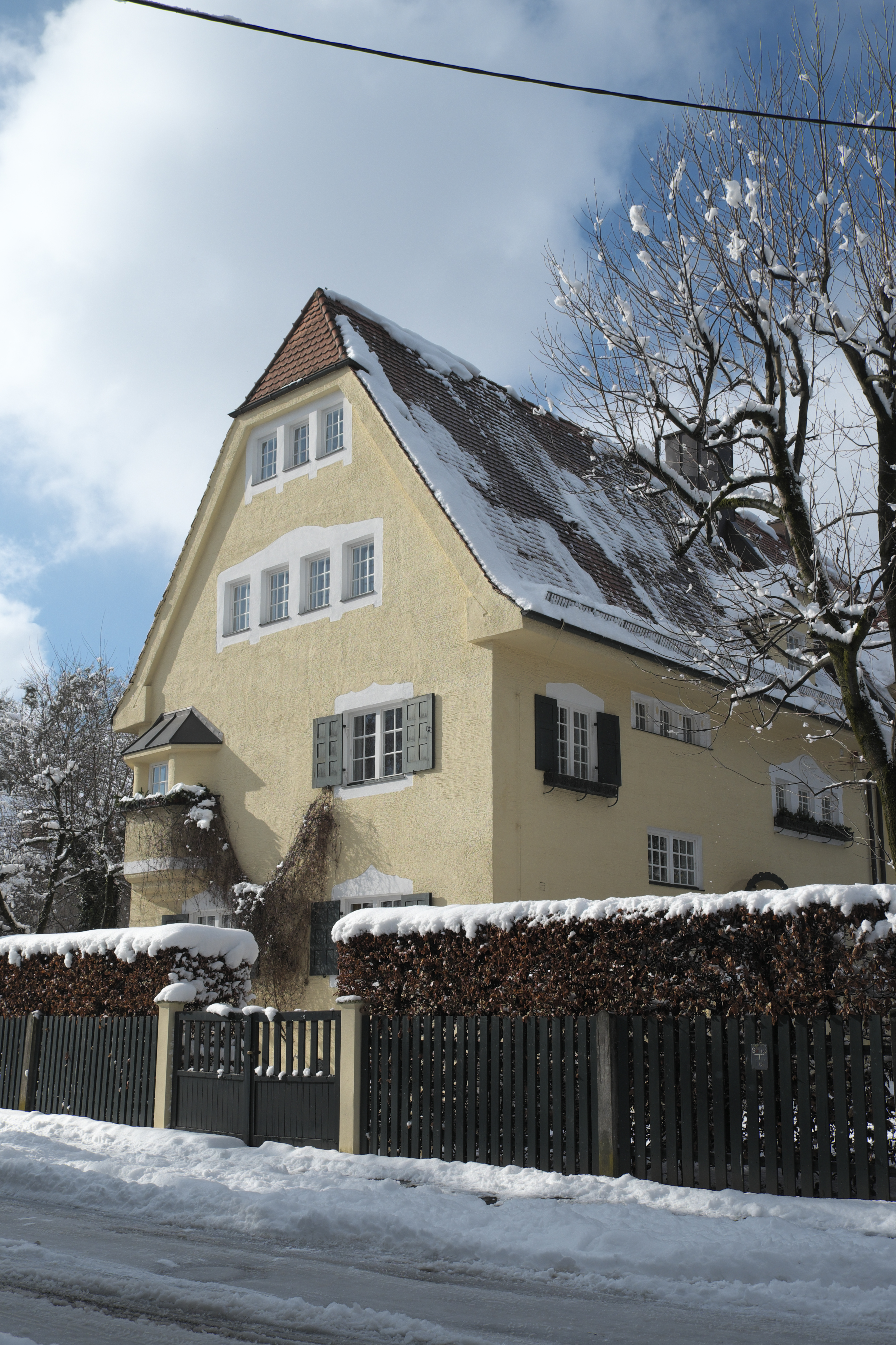 Wohnhaus in der Marsopstraße 28 in Obermenzing im Stadtbezirk Pasing-Obermenzing in München (Bayern/Deutschland), 1910 von Bernhard Borst erbaut